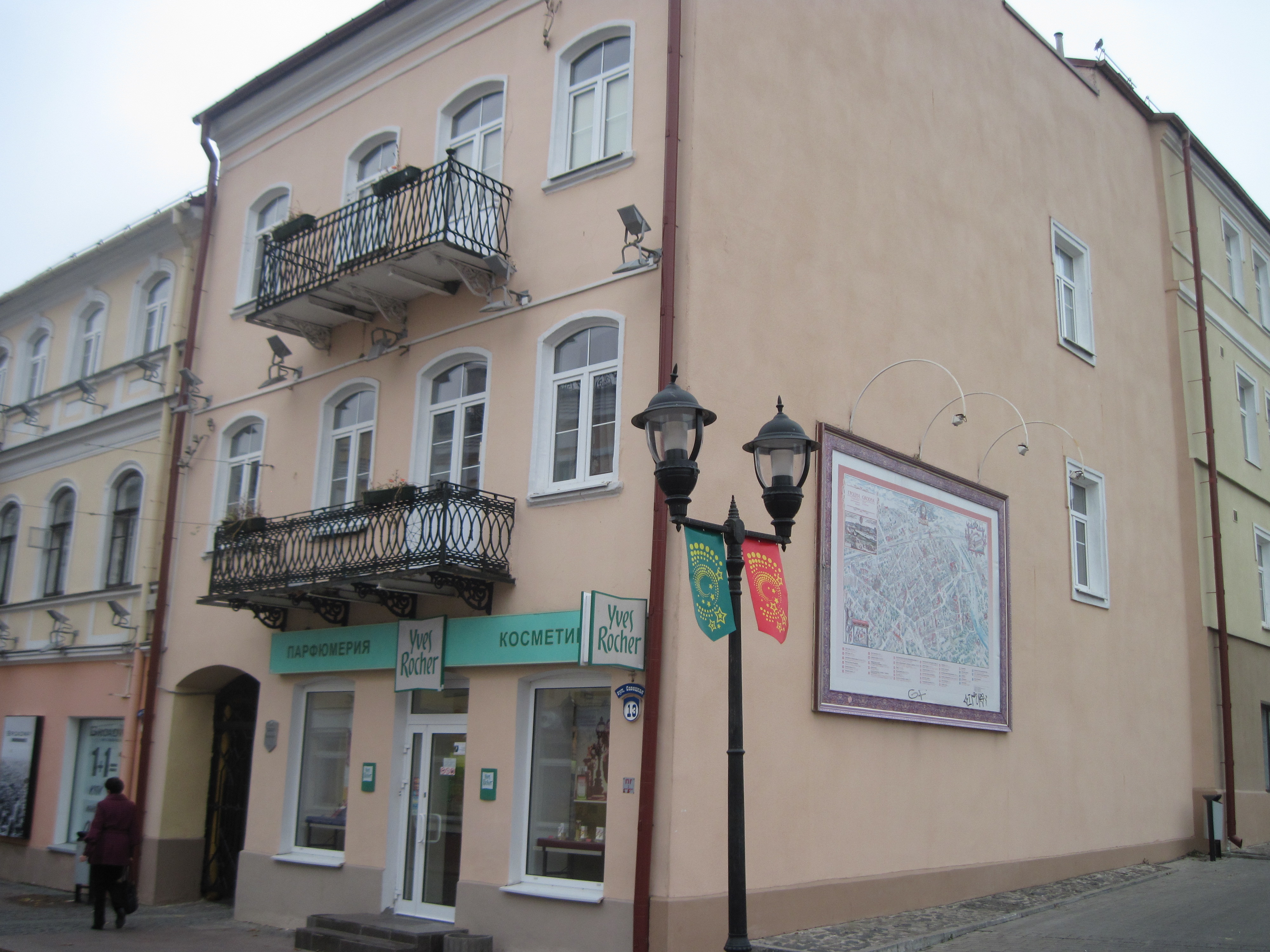 Беларуская (тарашкевіца): Фота будынку па вуліцы Савецкай, 13, у Гродна, Беларусь.